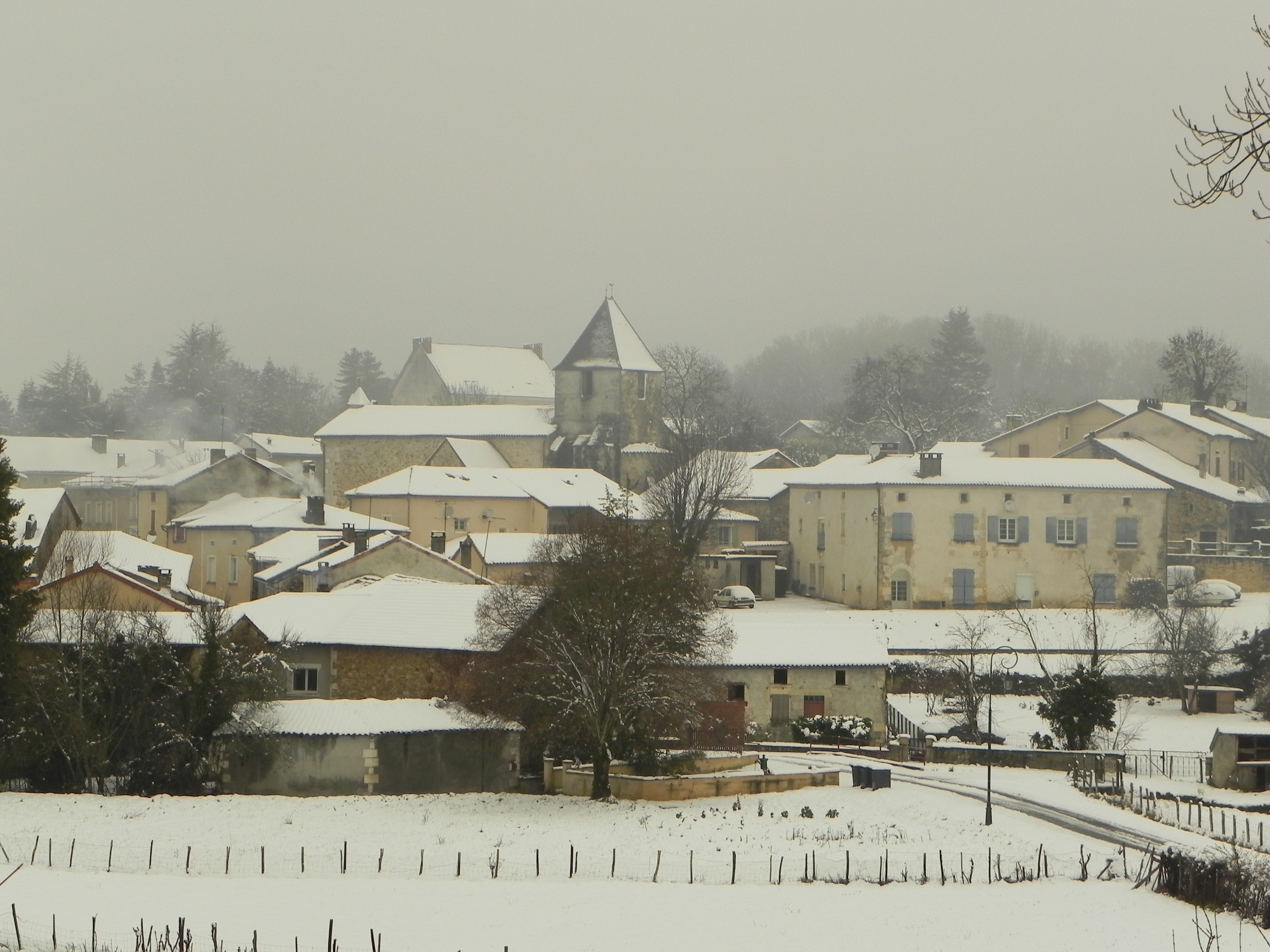 vue du village de Milhac-de-Nontron sous la neige en novembre 2010